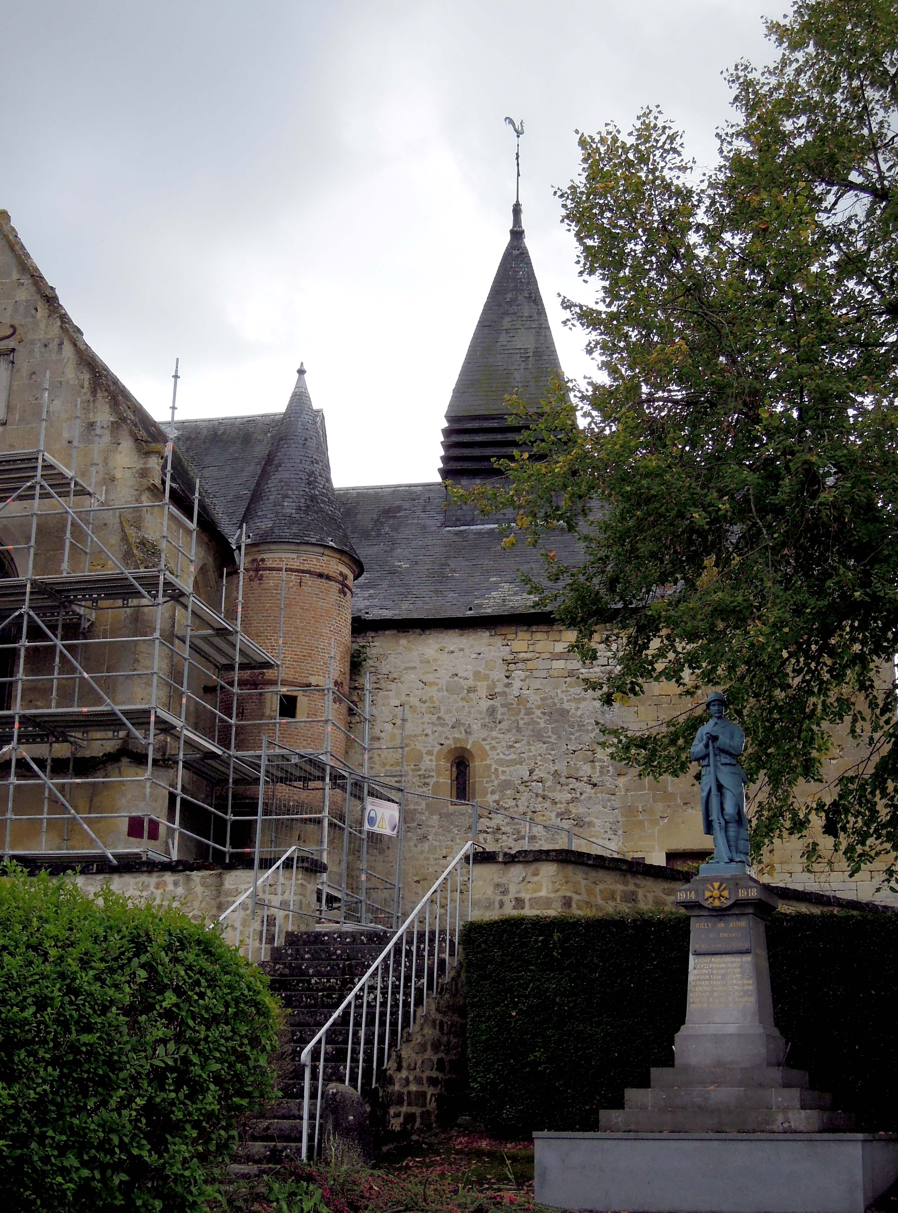 Église Saint-Waast, (Classé, 1920) .